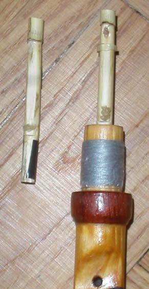 Foto på rörblad till svensk säckpipa, taget av i99jonma.